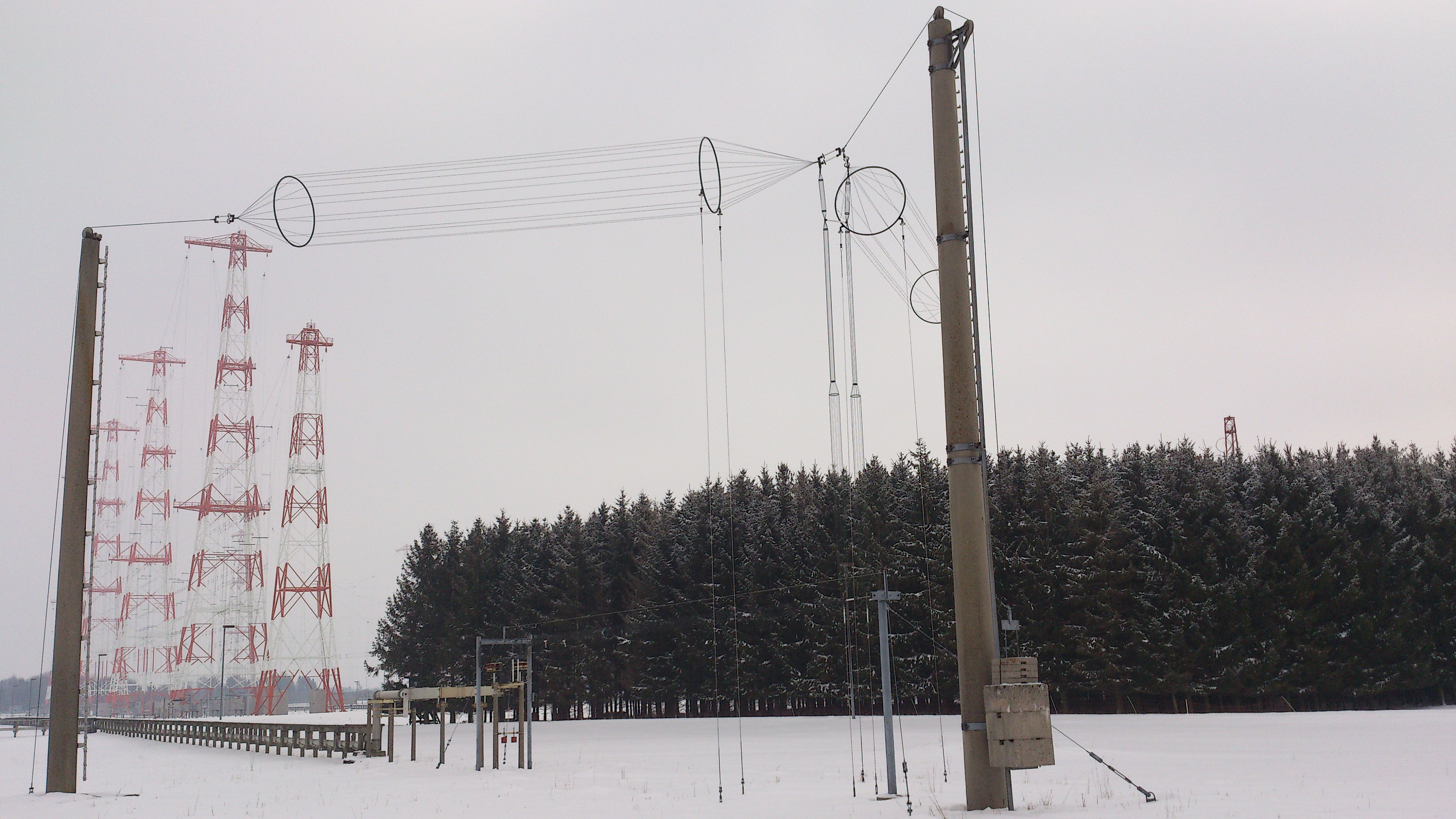 L-Dipol als Reusenantenne im Hintergrund die großen Hauptmasten der Kurzwellensendeanlage Wertachtal